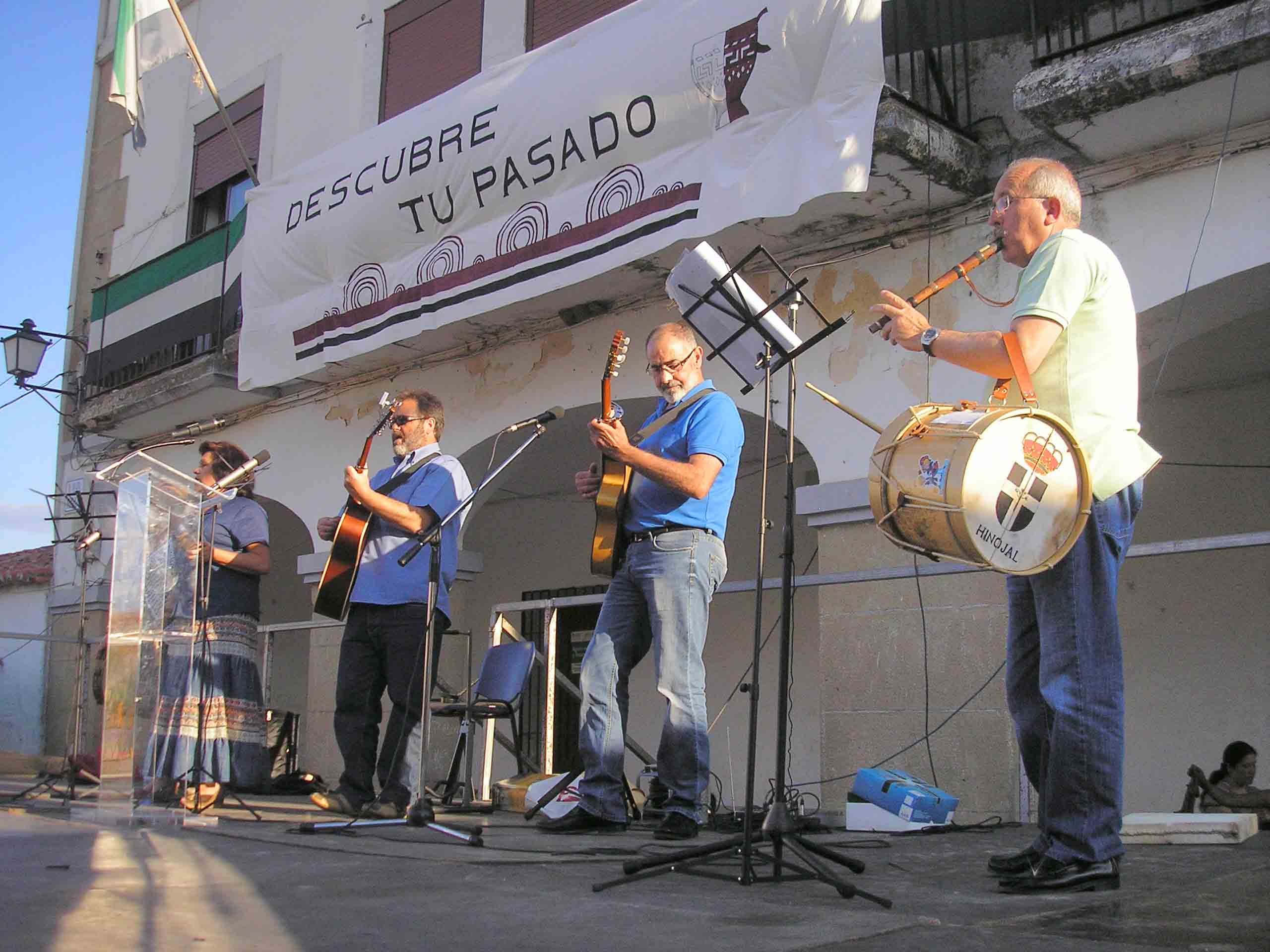 Estremeñu: Conciertu de Anhinojo Folk en Botija, en el I Encuentru del Estremeñu i la su Cultura i las jornás de puertas abiertas a Villas Viejas de Tamuxa.